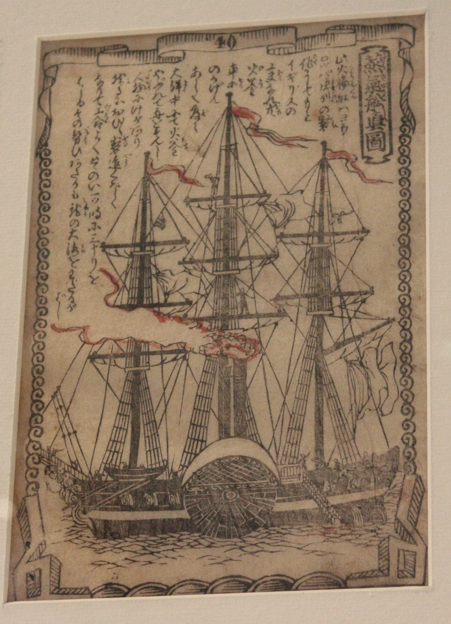 Page de livre, école Utagawa, bateau à vapeur représentant un des kurofune du Commodore américain Perry, 19e siècle (entre 1853-1867), Collection particulière (Exposition temporaire 2018 : Samouraï - Art et symbolisme du Japon)